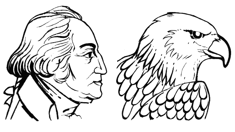 line art drawing explaining "aquiline."